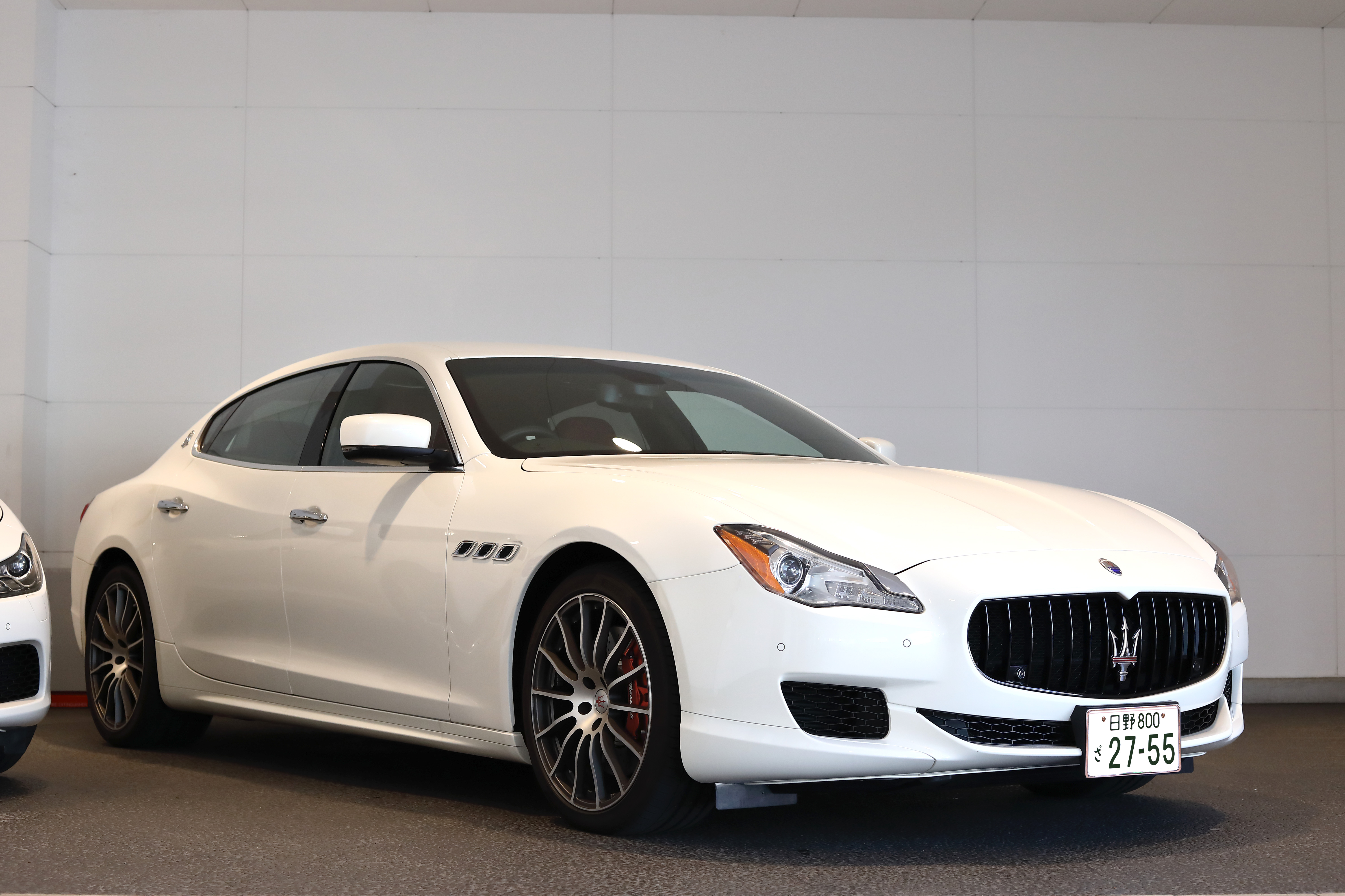 ja